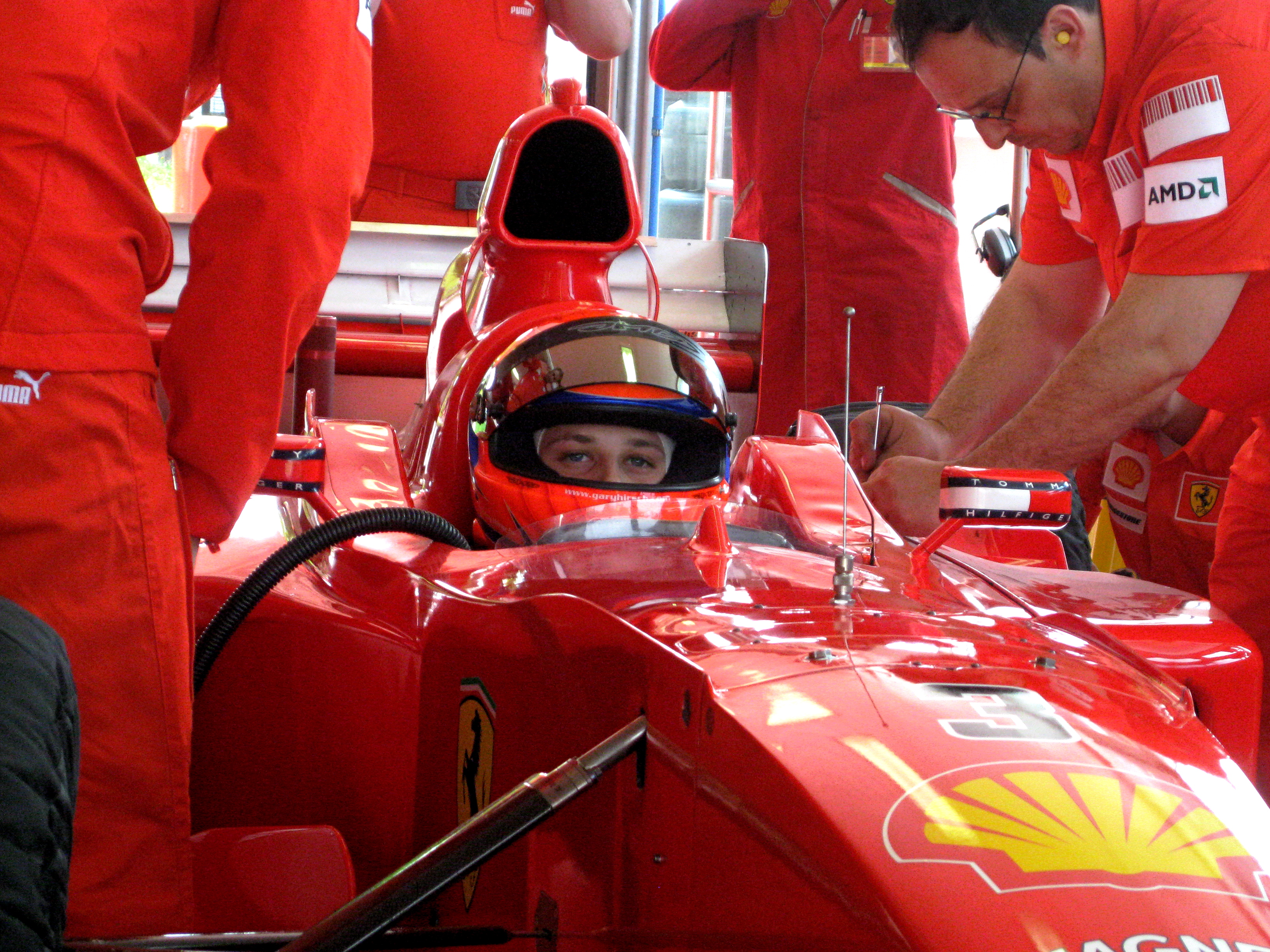 F1 - 2000 test Fiorano, Ferrari Corse Clienti